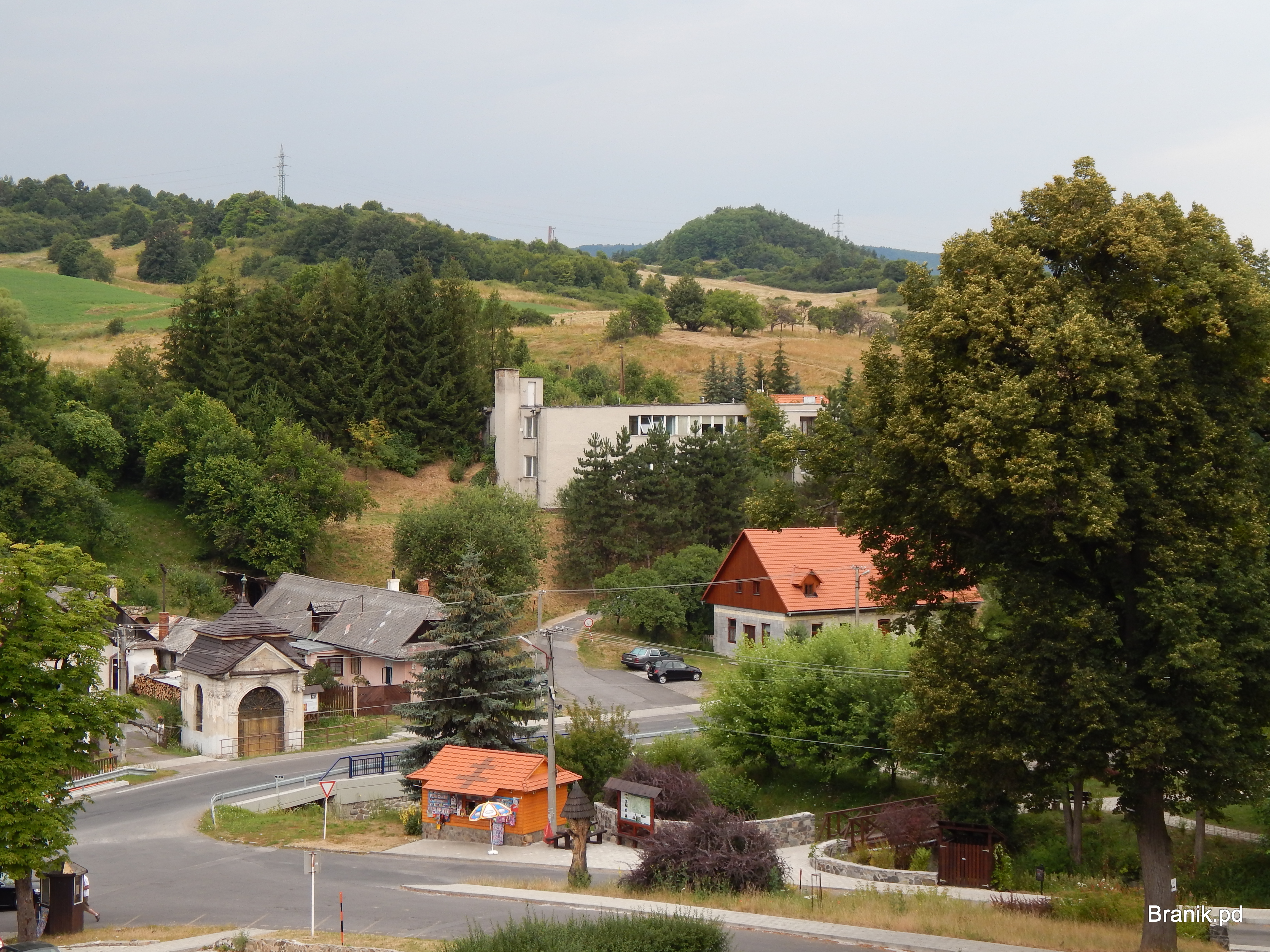 Kaštieľ Svätý Anton 3